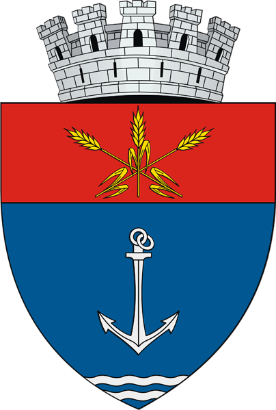 Coat of arms of Oltenița, Romania (from ro.wiki:Stema municipiului Olteniţa se compune dintr-un scut tăiat ce cuprinde în partea superioară (o treime), în câmp roşu, un mănunchi alcătuit din trei spice de grâu de aur, cu câte două frunze fiecare, din acelaşi material. În partea inferioară (două treimi), în câmp albastru, este reprezentată o ancoră de argint, iar la baza sa sunt două fascii din acelaşi material. Scutul este timbrat cu o coroană murală din argint, formată din cinci turnuri crenelate, care conferă localităţii statutul de municipiu. Spicele de grâu evocă rolul aşezării în producţia agricolă, simbolizând bogăţia câmpiei din Lunca Dunării. Ancora evocă faptul că aşezarea este port şi reprezintă principala activitate industrială a localităţii. Cele două fascii de la baza scutului semnifică faptul că localitatea este situată într-o bogată zonă piscicolă, fiind mărginită de fluviul Dunărea şi râul Argeş.)